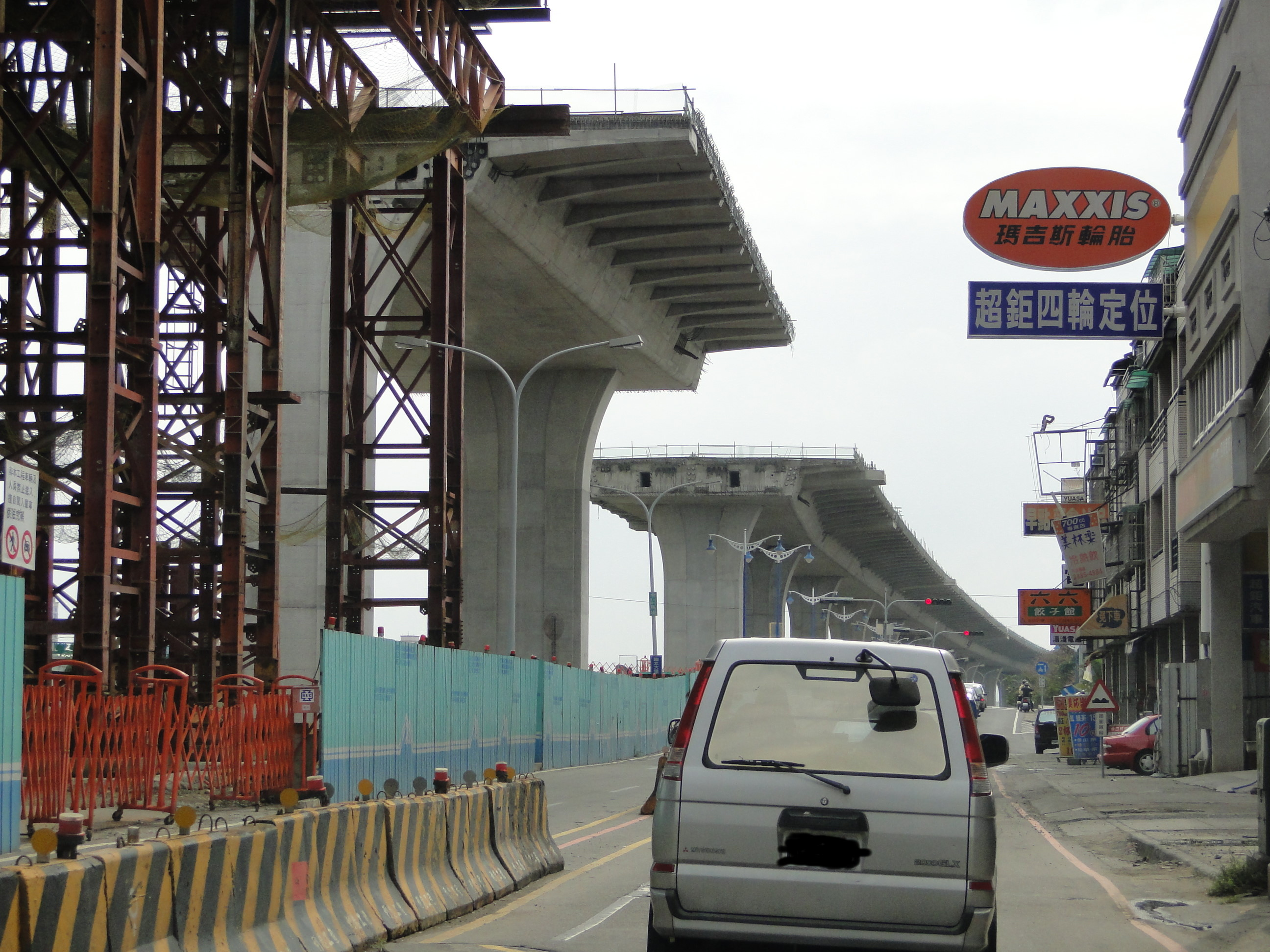 中文（台灣）: 左側高架橋為台灣台中生活圈四號道路，中央平面道路為大里市元堤路一段。